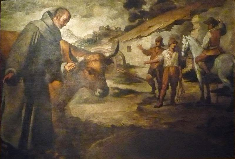 La obra muestra a San Francisco Solano (1549-1610) junto a un toro.